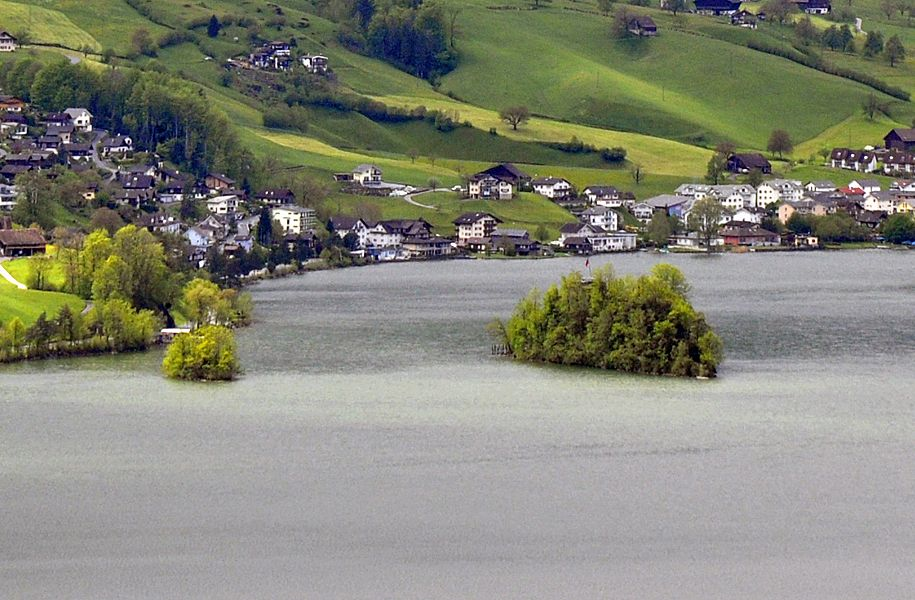 Insel Schwanau, Ansicht von oberhalb Schwyz